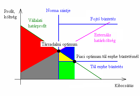 Termelői externália szabályozása kibocsátási norma bevezetésével